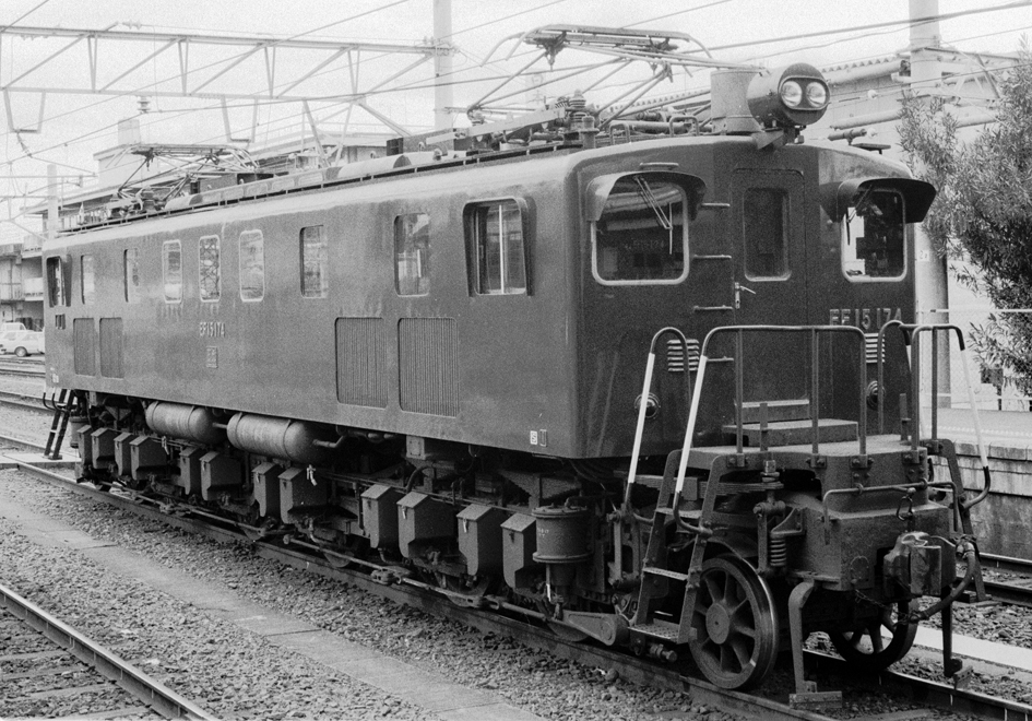 国鉄 EF15 174 杉本町駅